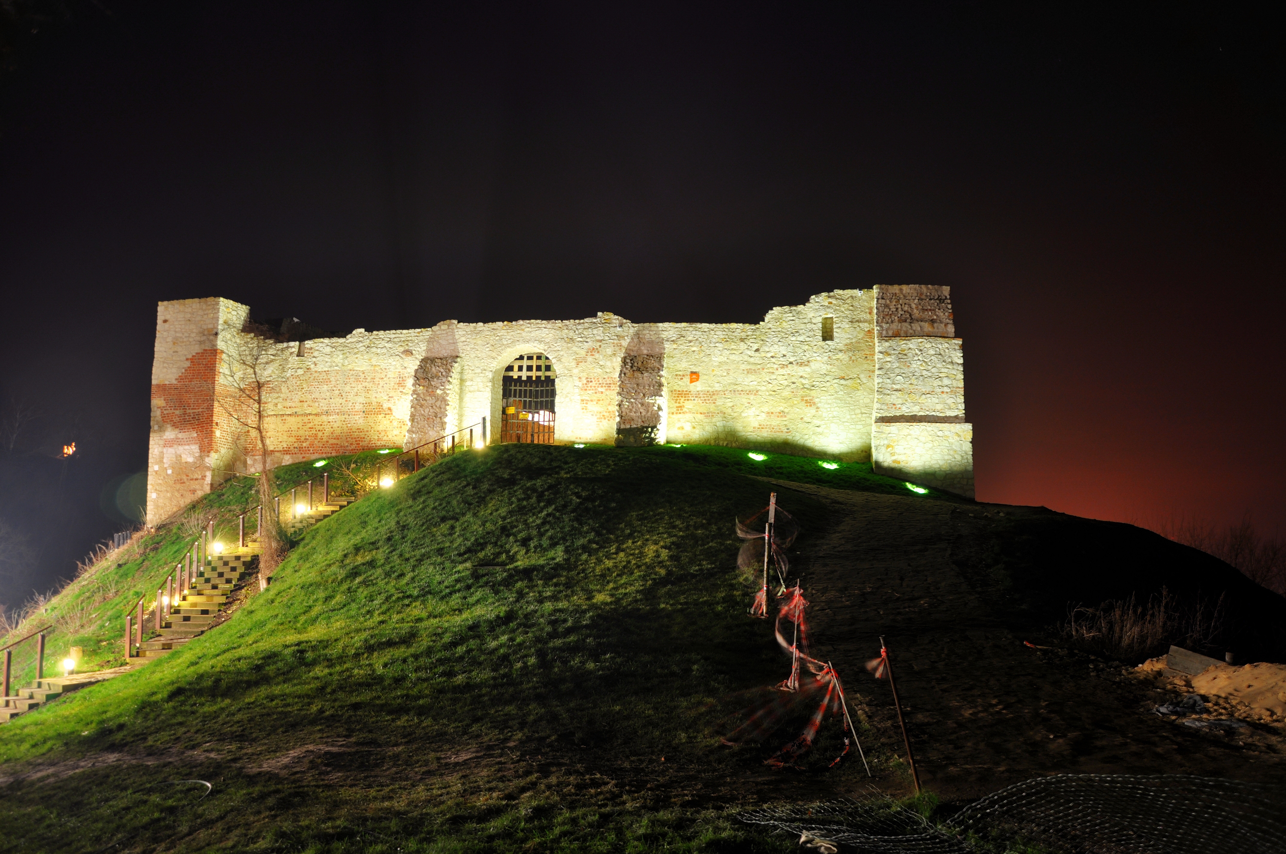 Zamek w nocy